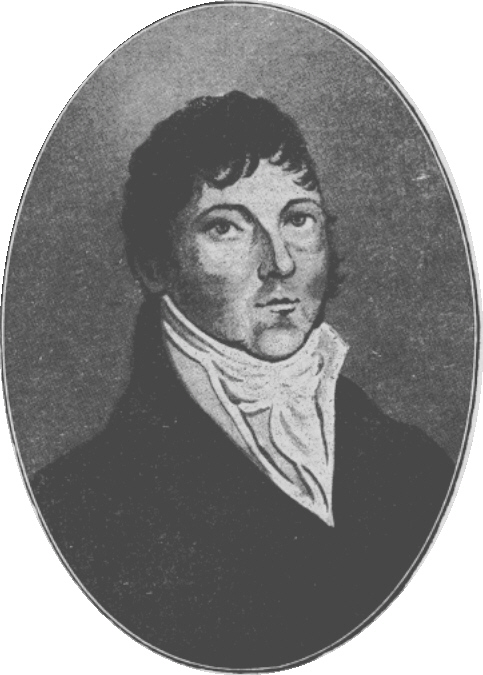 Johann Gottfried Dingler (* 2. Januar 1778 in Zweibrücken; † 19. Mai 1855 in Augsburg), Apotheker, gründete aber später in Augsburg eine Fabrik chemischer Produkte und eine Kattundruckerei.